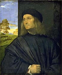 Portrait of Giovanni Bellini